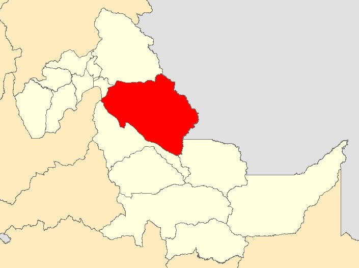 Mapa distrito Masisea,Ucayali - Perú